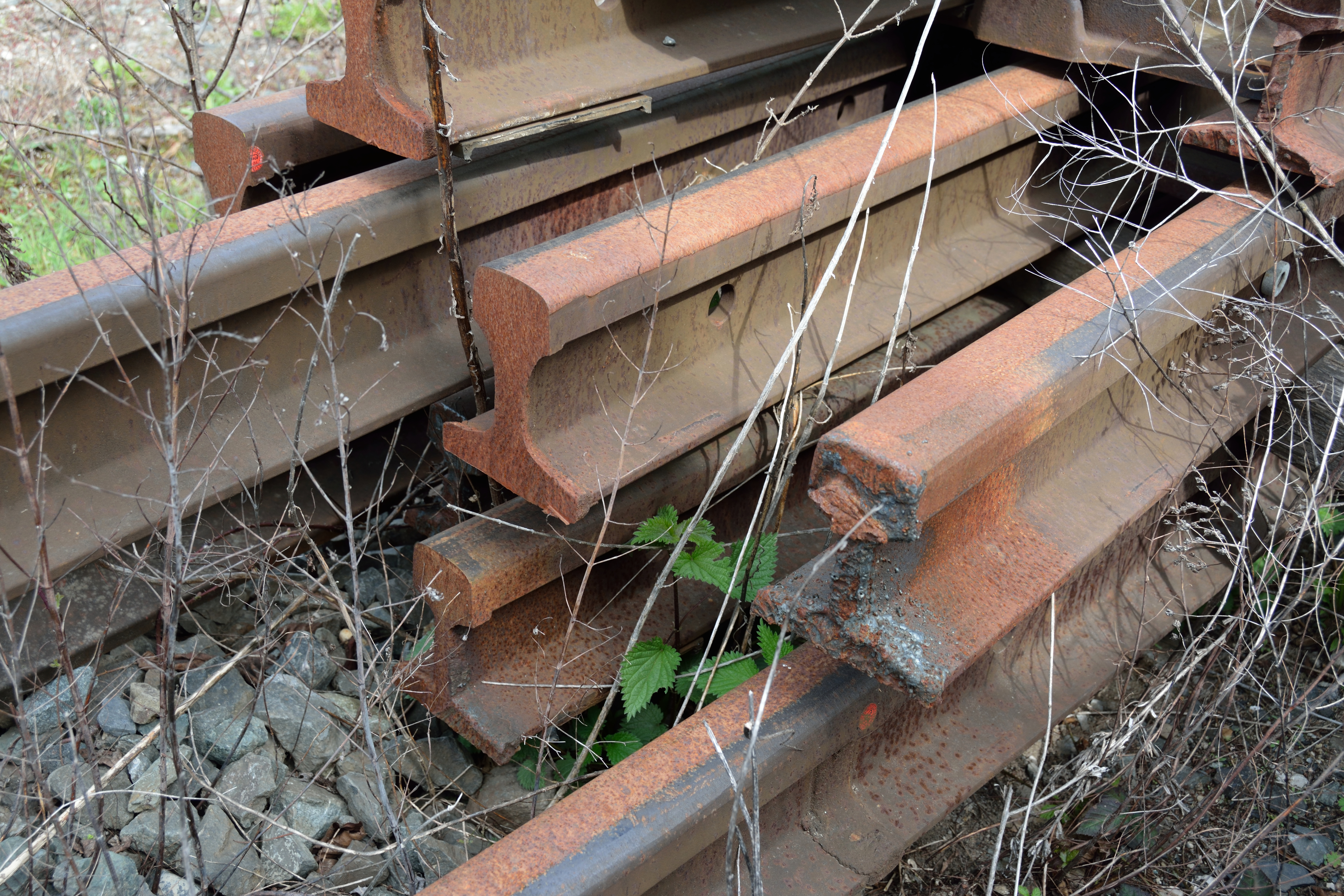 Impressionen vom Südbahnhof in Nürnberg. Eisenbahnschienen, abgeschnitten durch Tennscheibe und durch Brennschneiden.